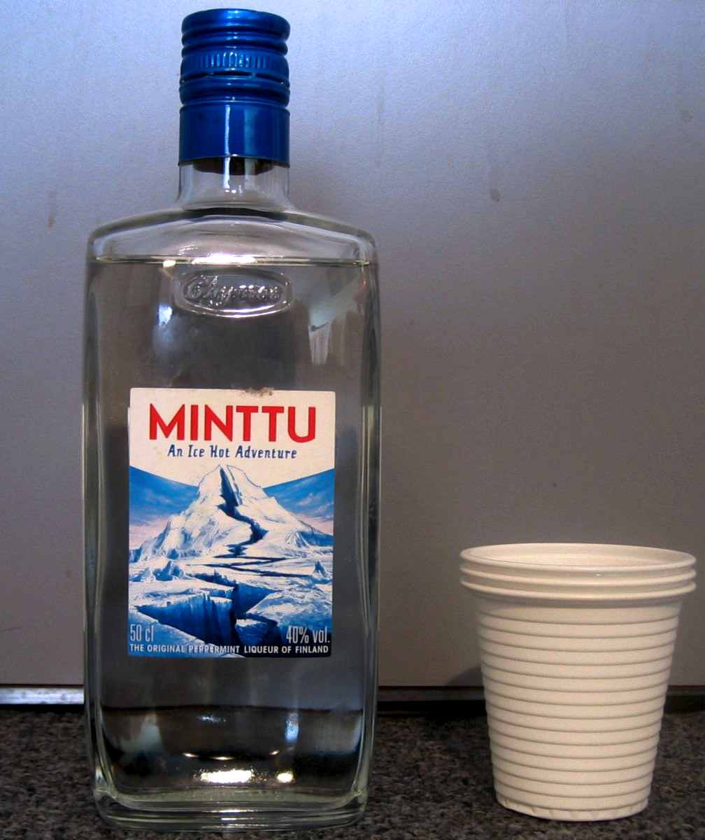 Minttu, finnischer Pfefferminzlikör Minttu, Finnish peppermint liqueur Minttu, suomalainen likööri